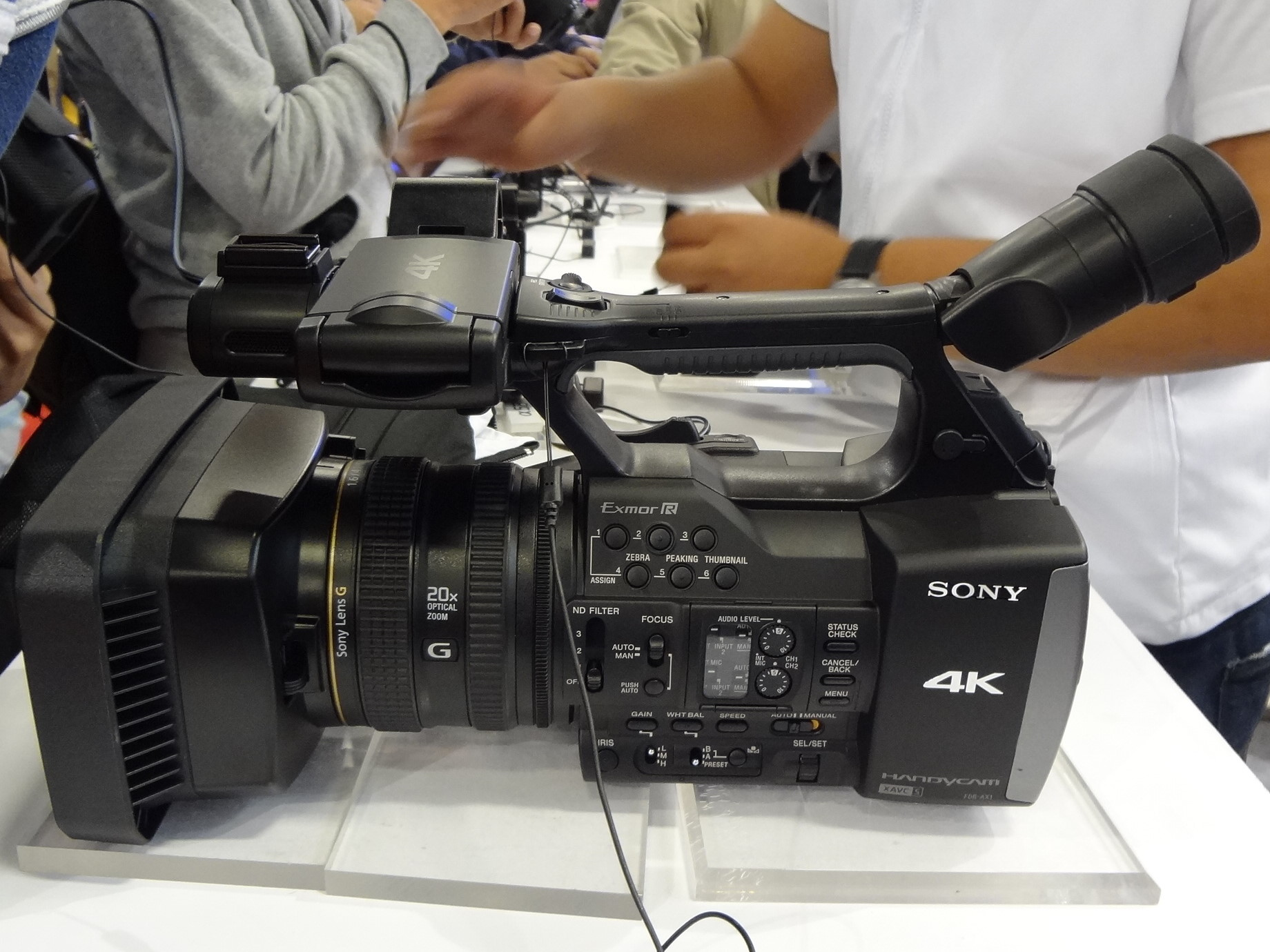 2013年資訊月，Sony攤位展示的Handycam消費型4K解析度攝影機FDR-AX1。